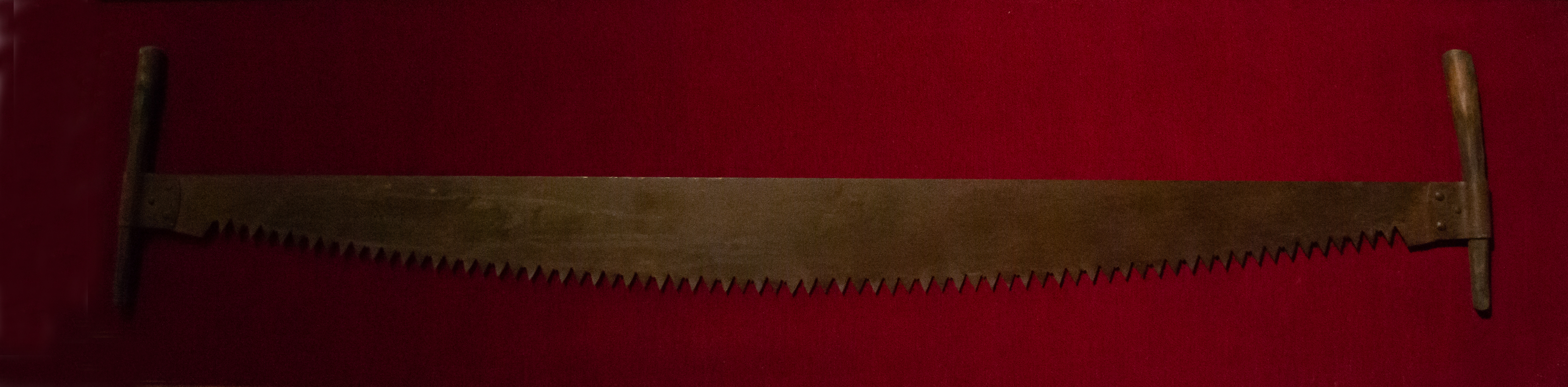 Sierra (instrumento de tortura). Exposición Inquisición en el Palacio de los Olvidados de Granada.